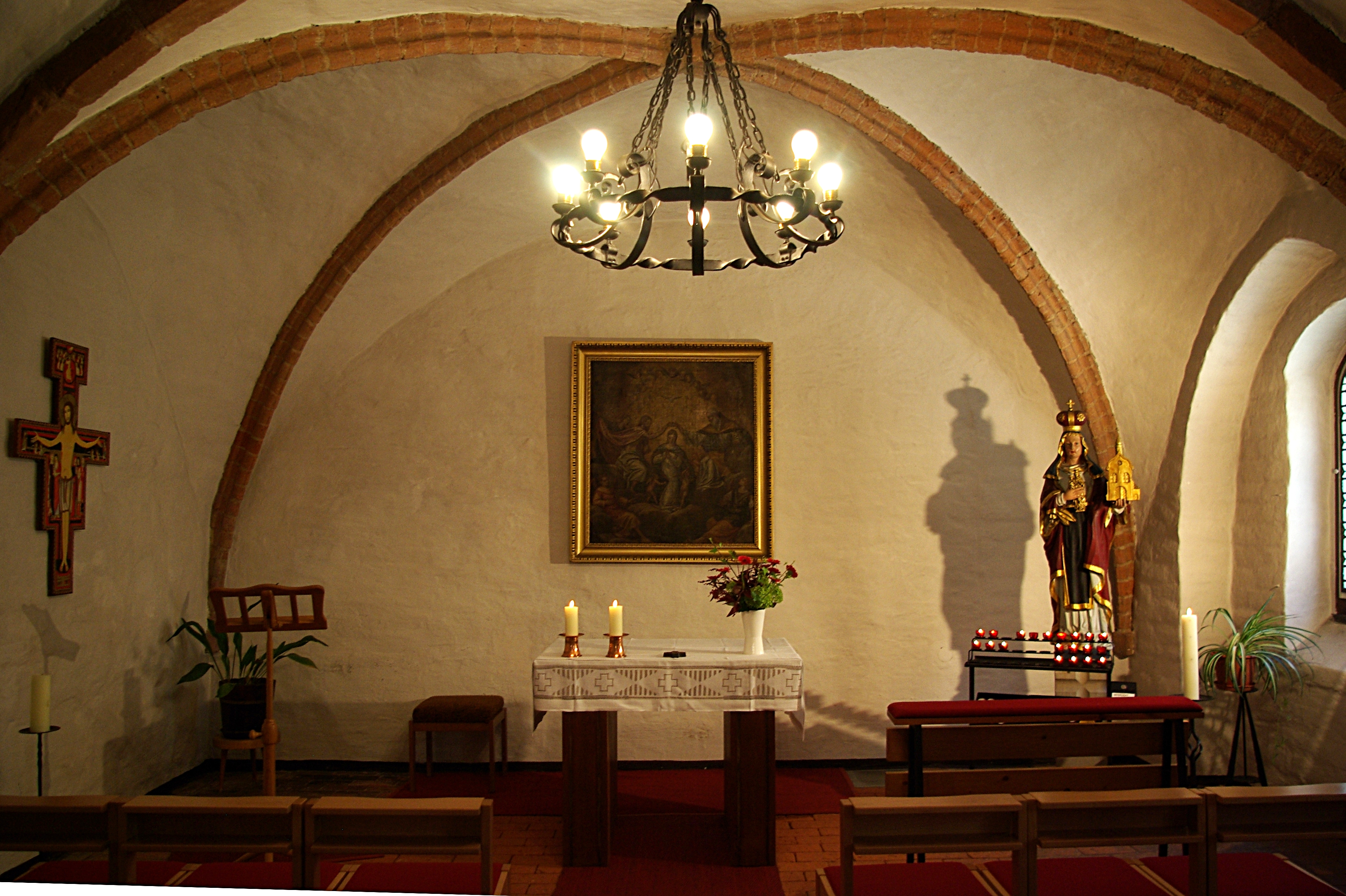 Jüterbog in Brandenburg. Die Tetzelkapelle liegt an der Katholischen Kirche in Jüterbog an der Großen Straße. Die Kapelle steht unter Denkmalschutz.